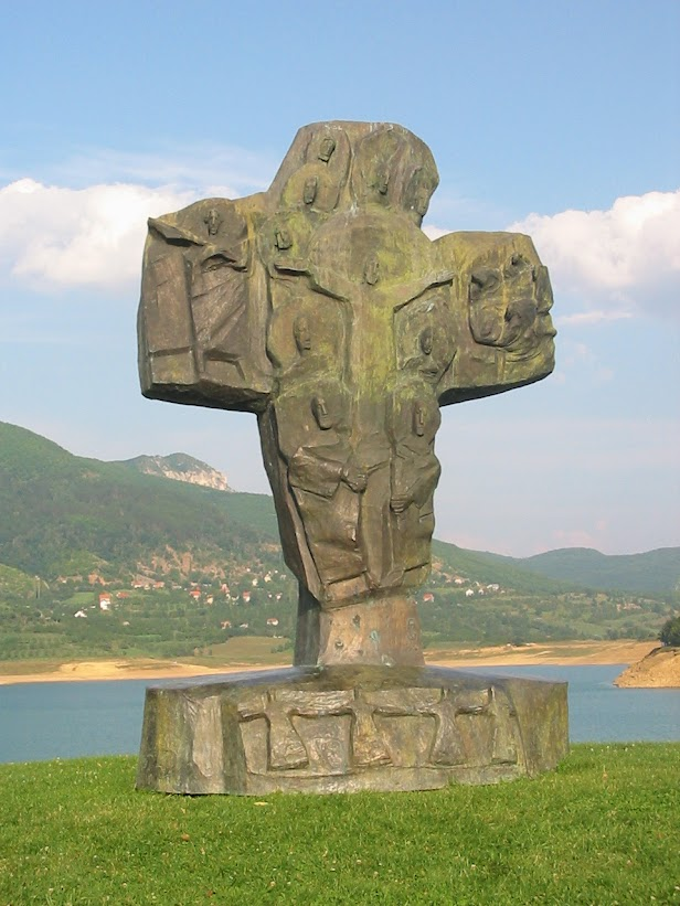 Križ kraj samostana Rama-Šćit